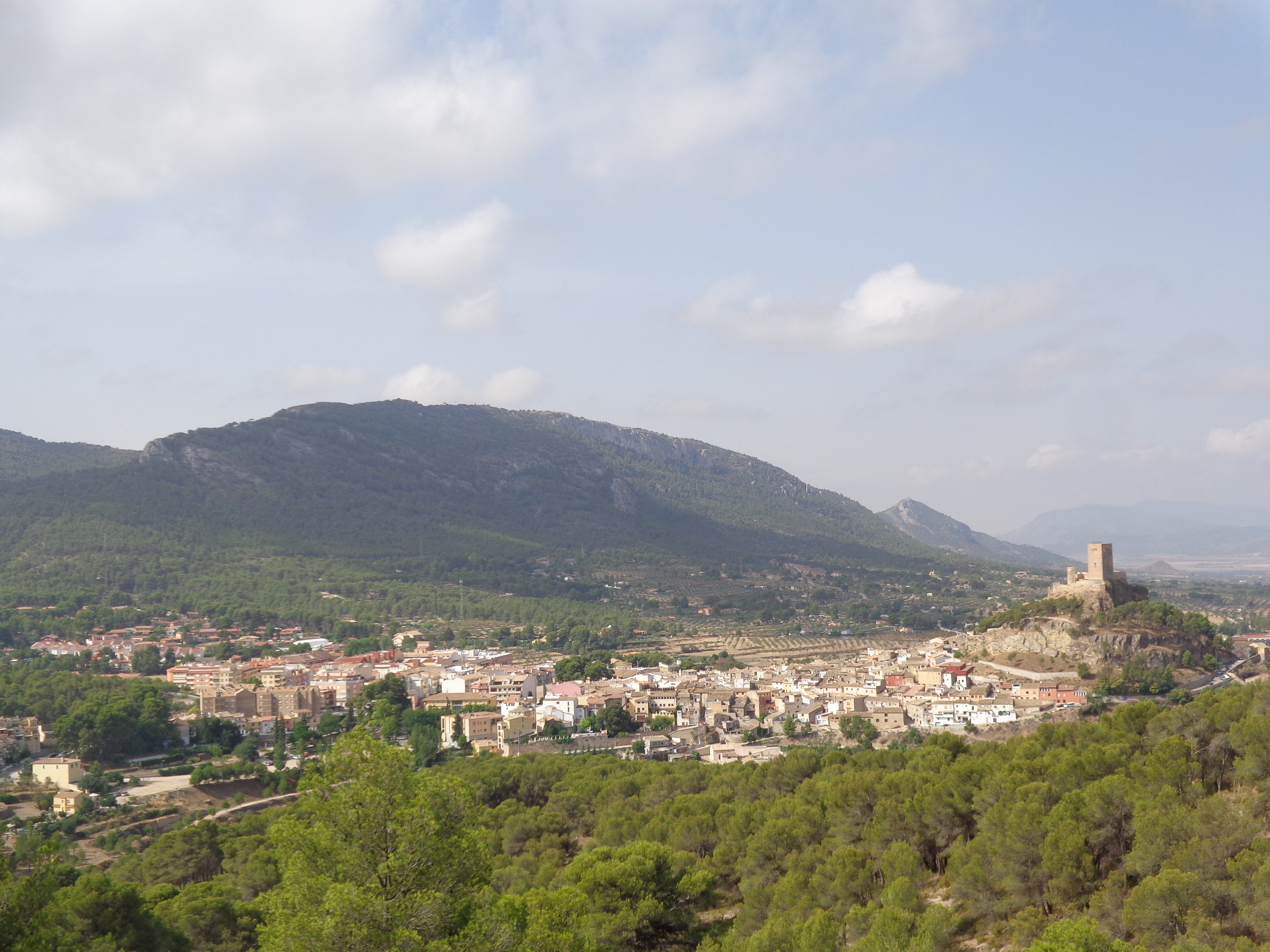 Biar con il castello